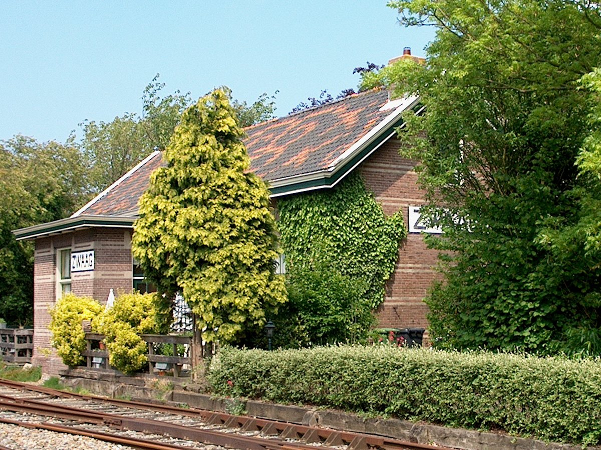 Voormalig stationsgebouw Zwaag